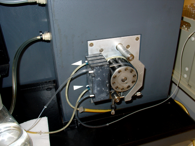 Peristaltické čerpadlo pro čerpání a dávkování kapalin